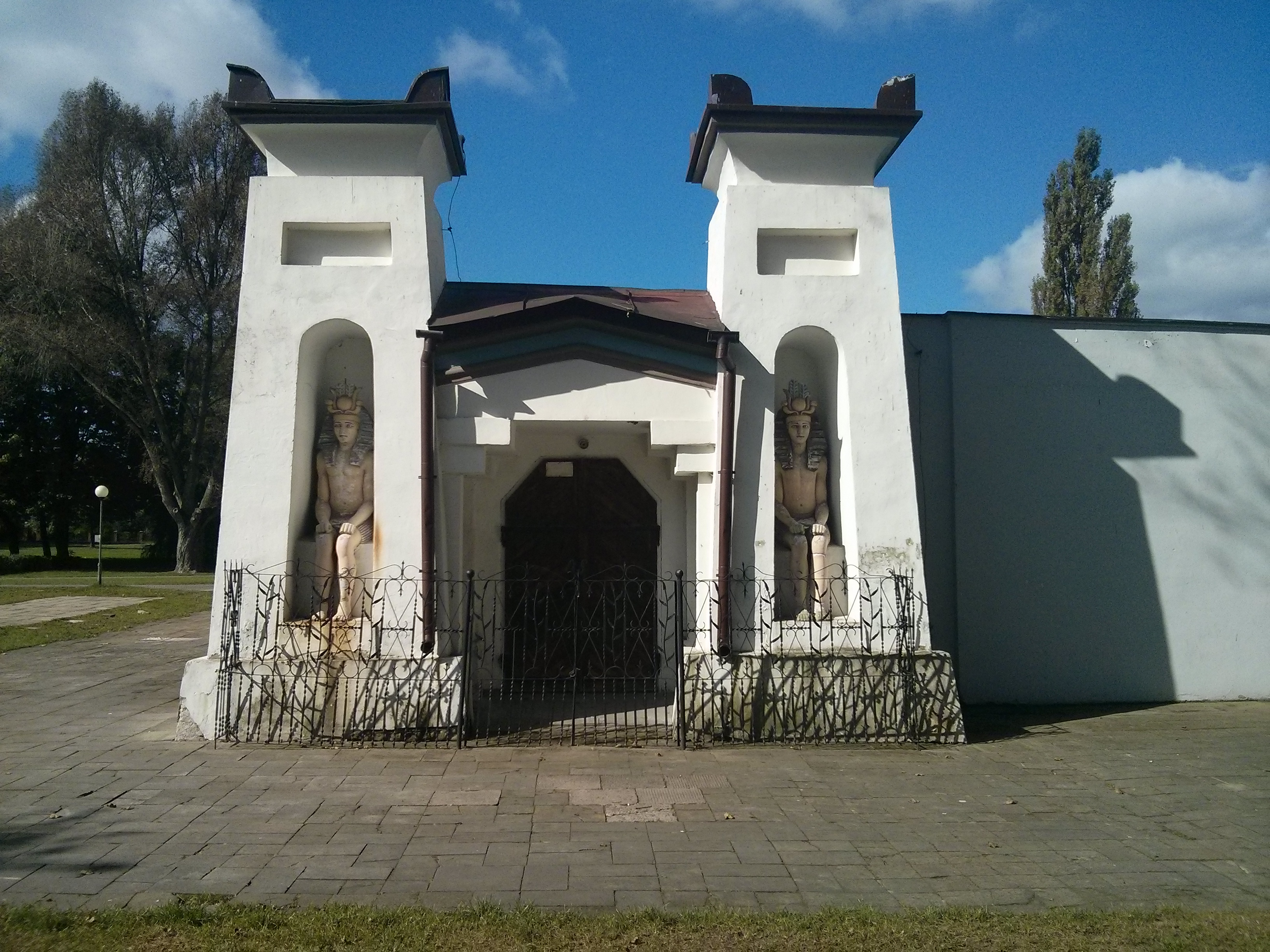 Końskie, oranżeria egipska, 1825 r., widok z E